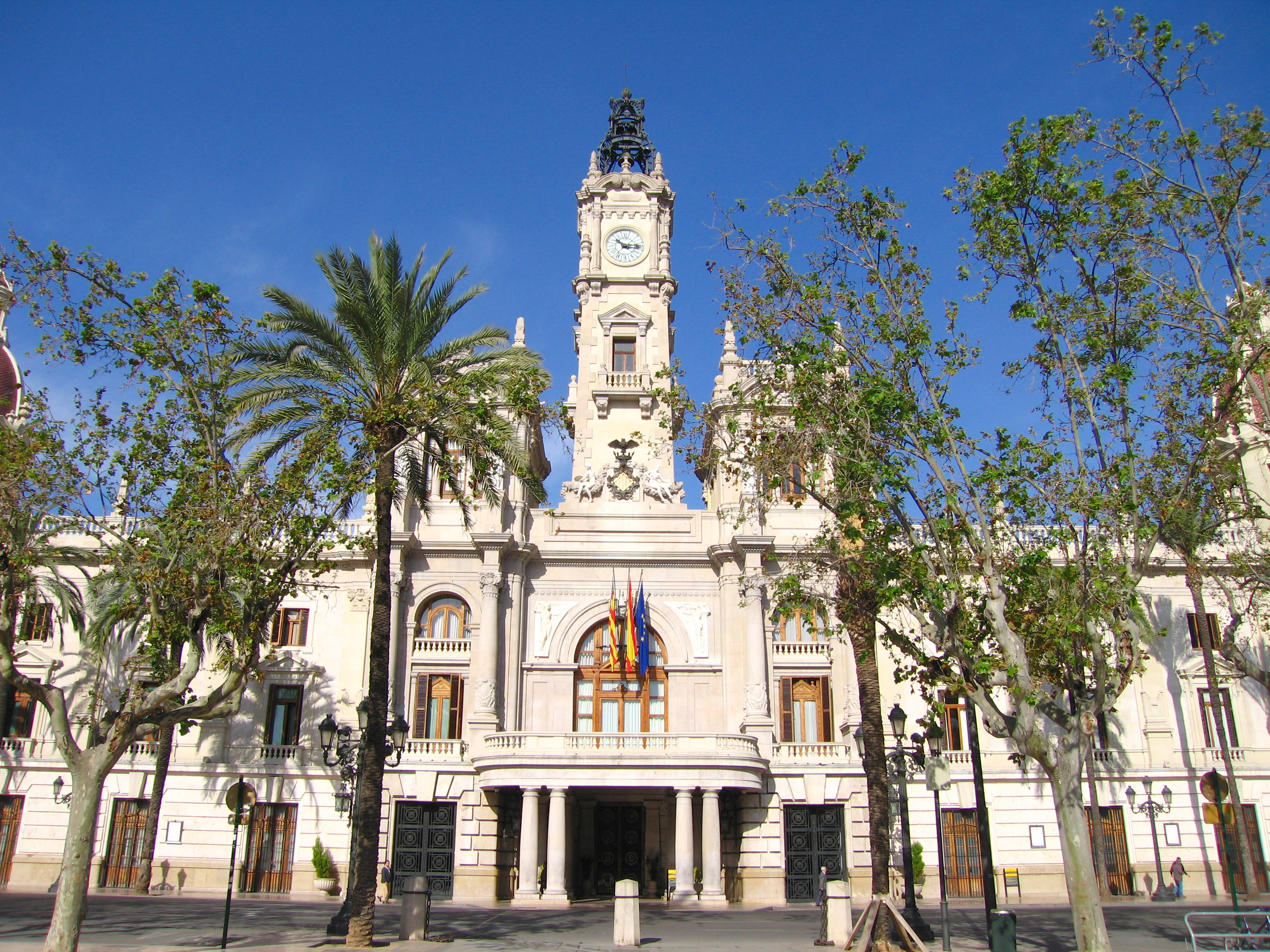 Ajuntament de València